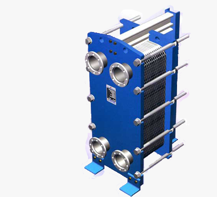 Vật liệu tấm : STS203, STS316 - Gasket : EPDM, NBR, Viton